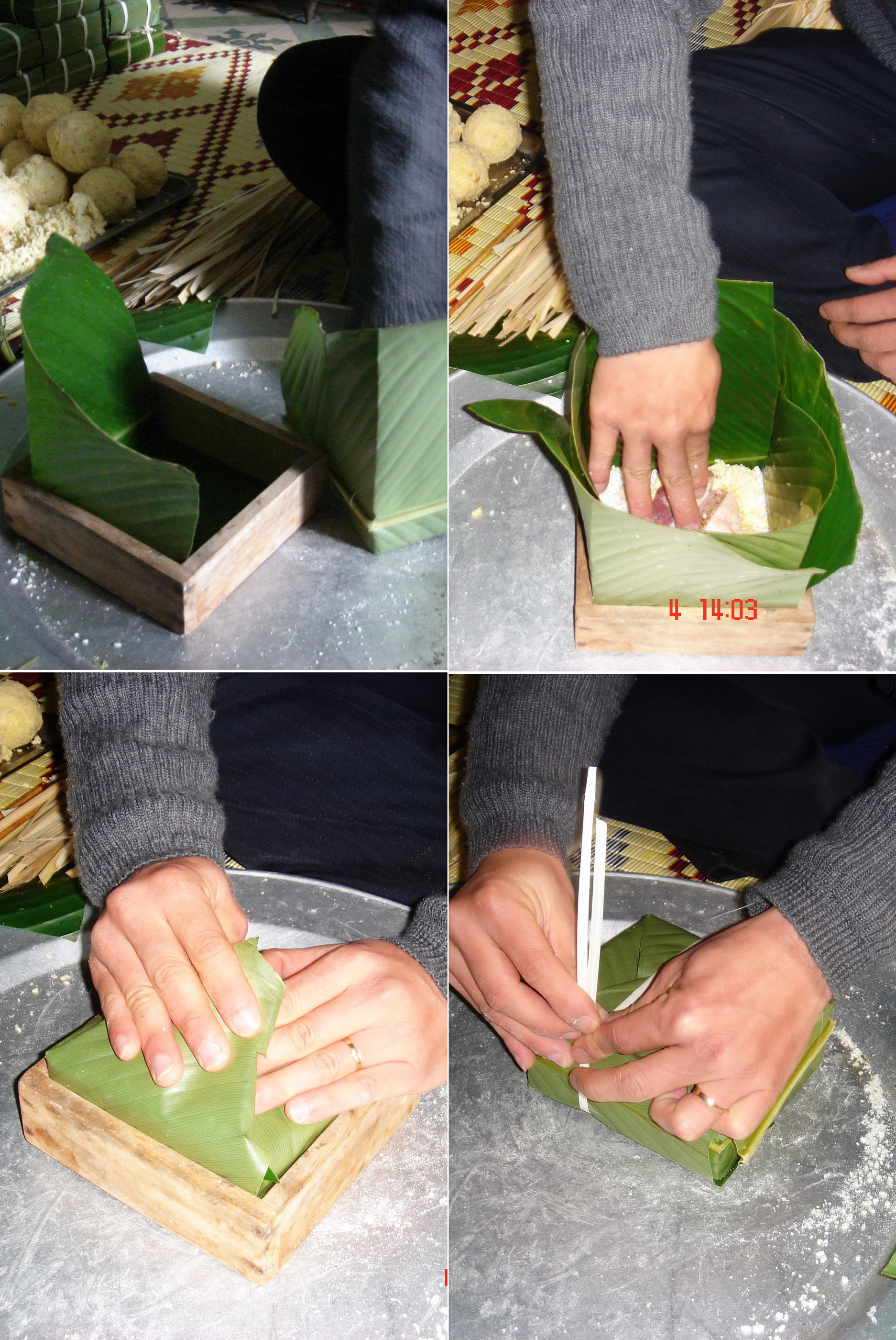 Quy trình gói bánh chưng vuông dùng khuôn